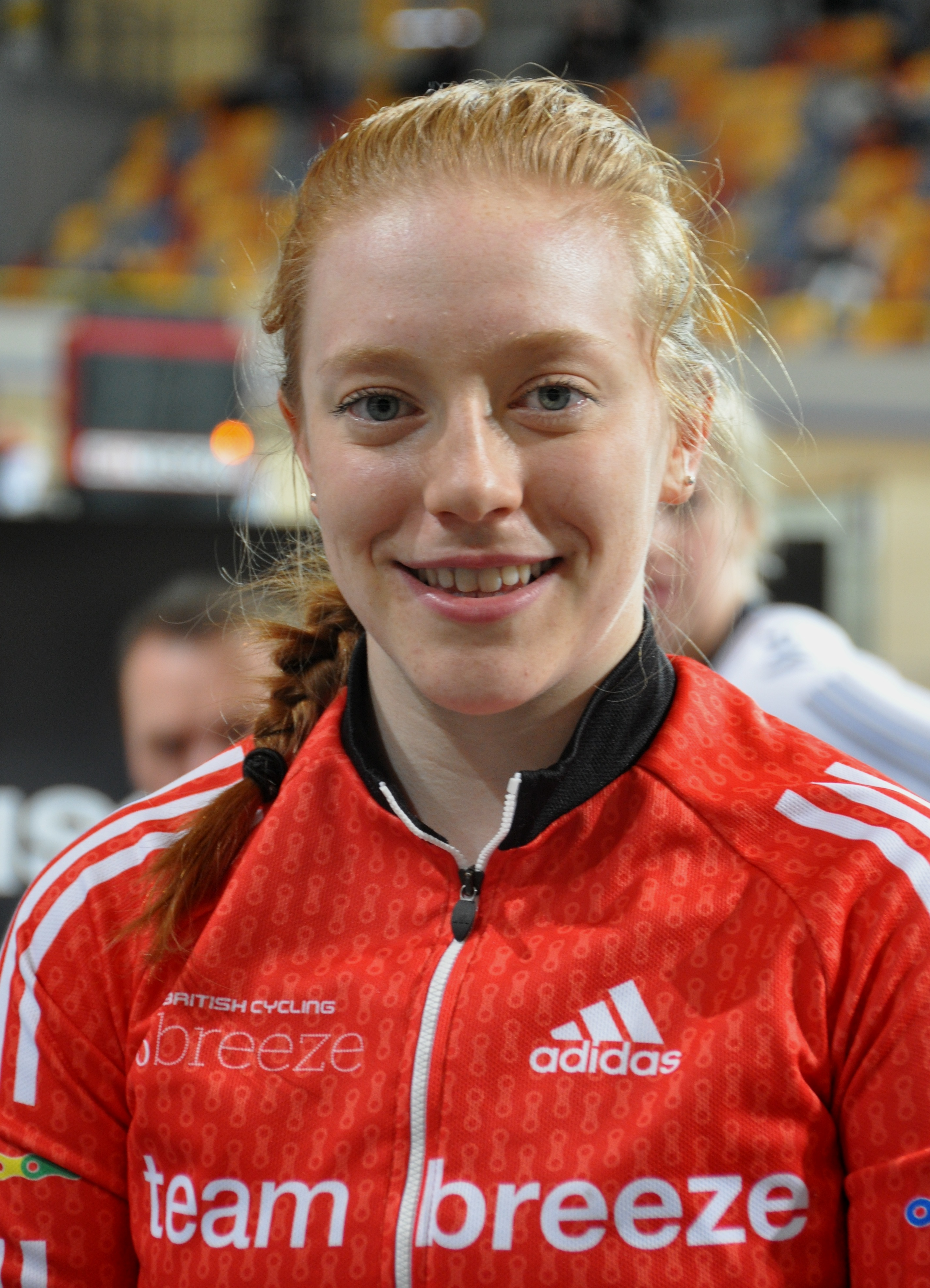 Emily Nelson, britische Radsportlerin